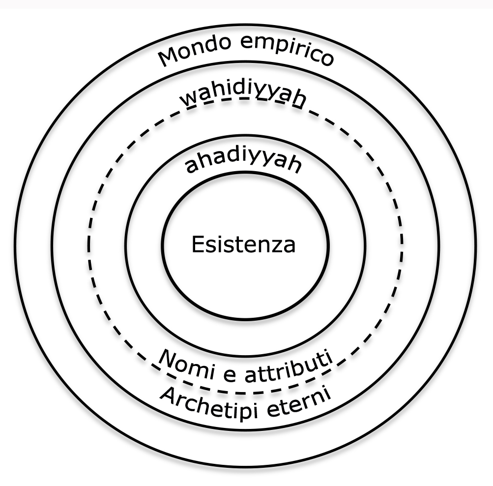 L'immagine descrive la visione Sufi secondo la dottrina dell'Unicità dell'Esistenza